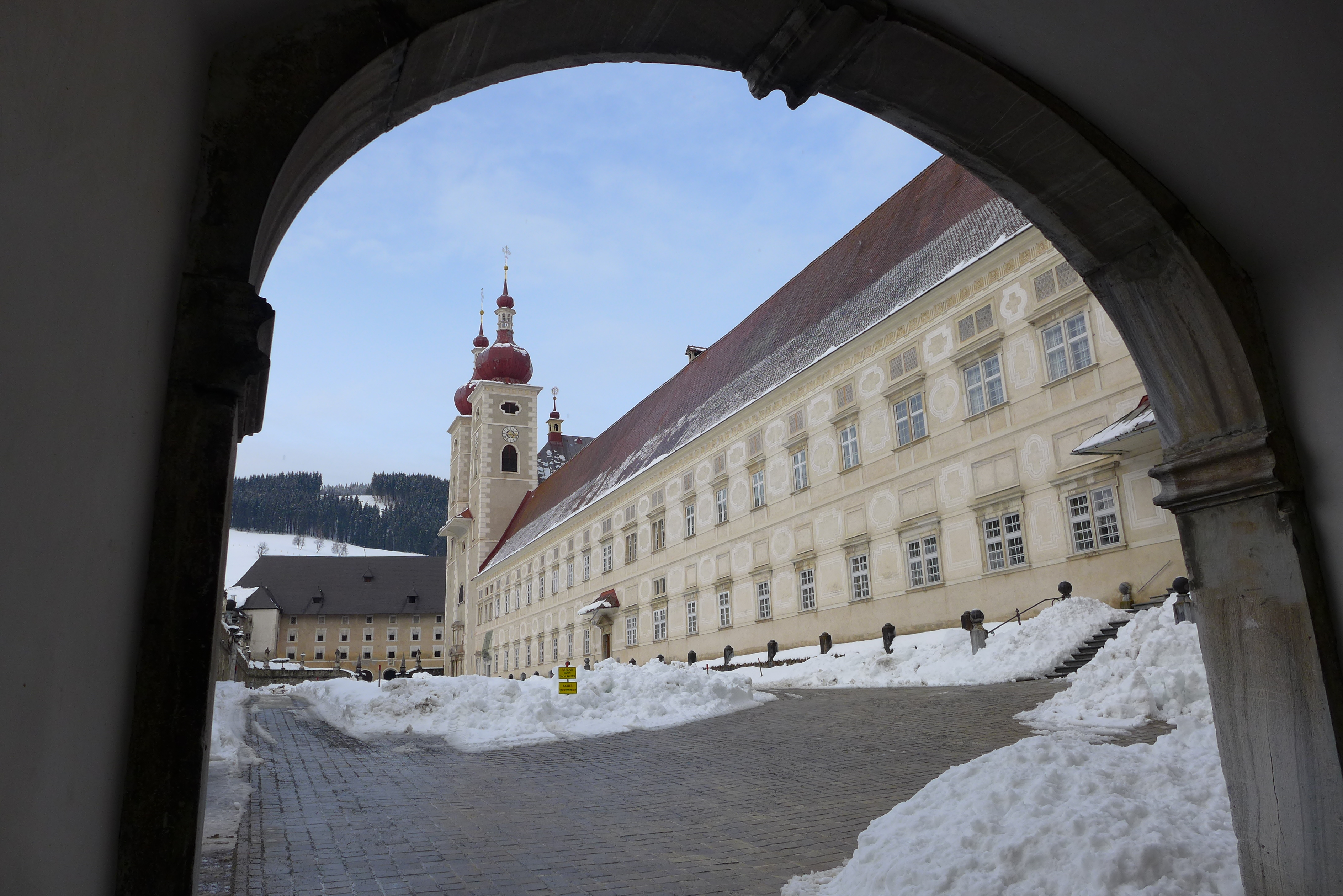 Stift St. Lambrecht - Blick in den äußeren Stiftshof im Winter